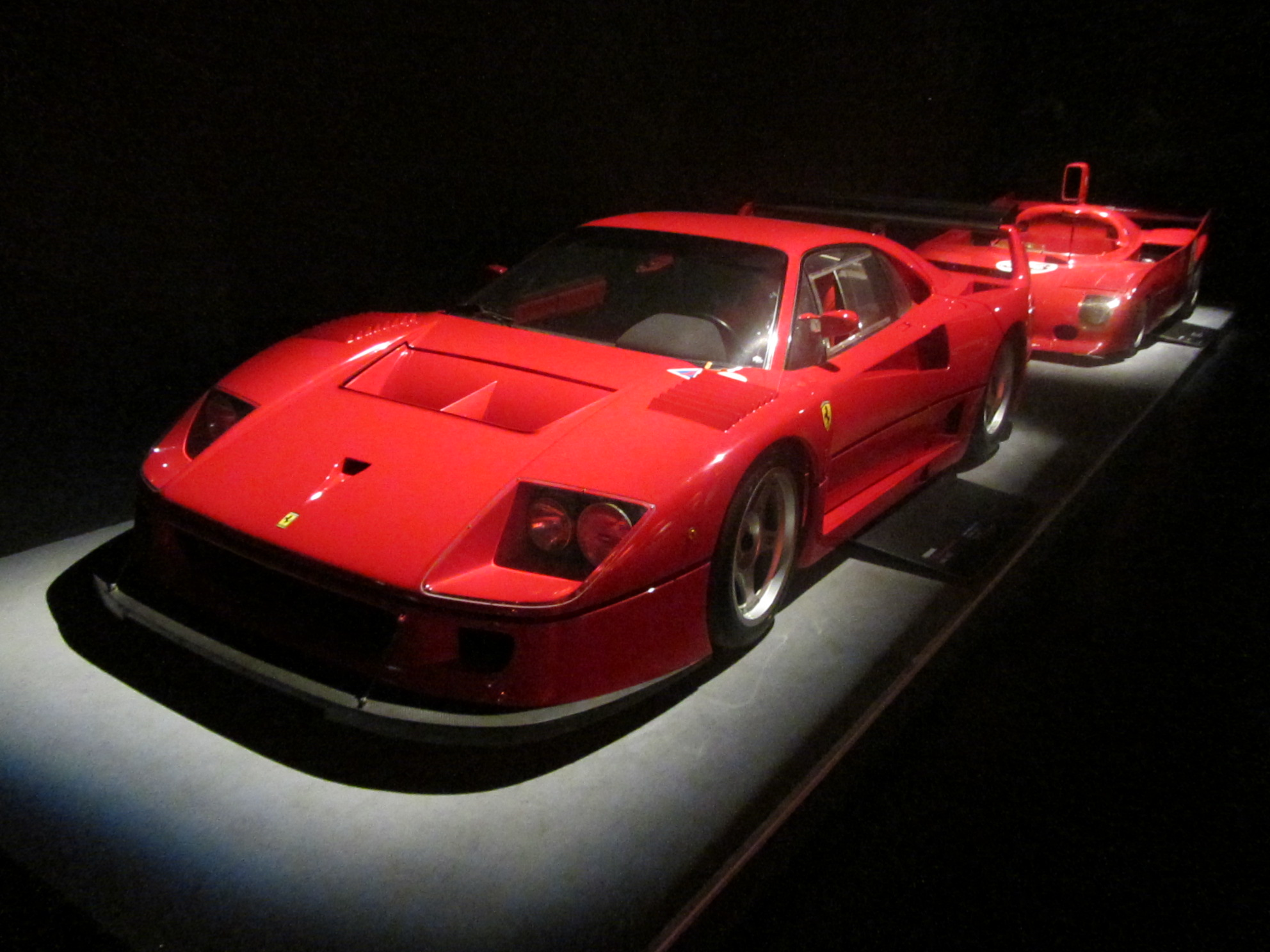 Una Ferrari F40 Competizione e una Alfa 33 TT 12 al Museo dell'automobile di Torino